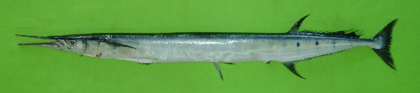 Ablena (Ablennes hians)